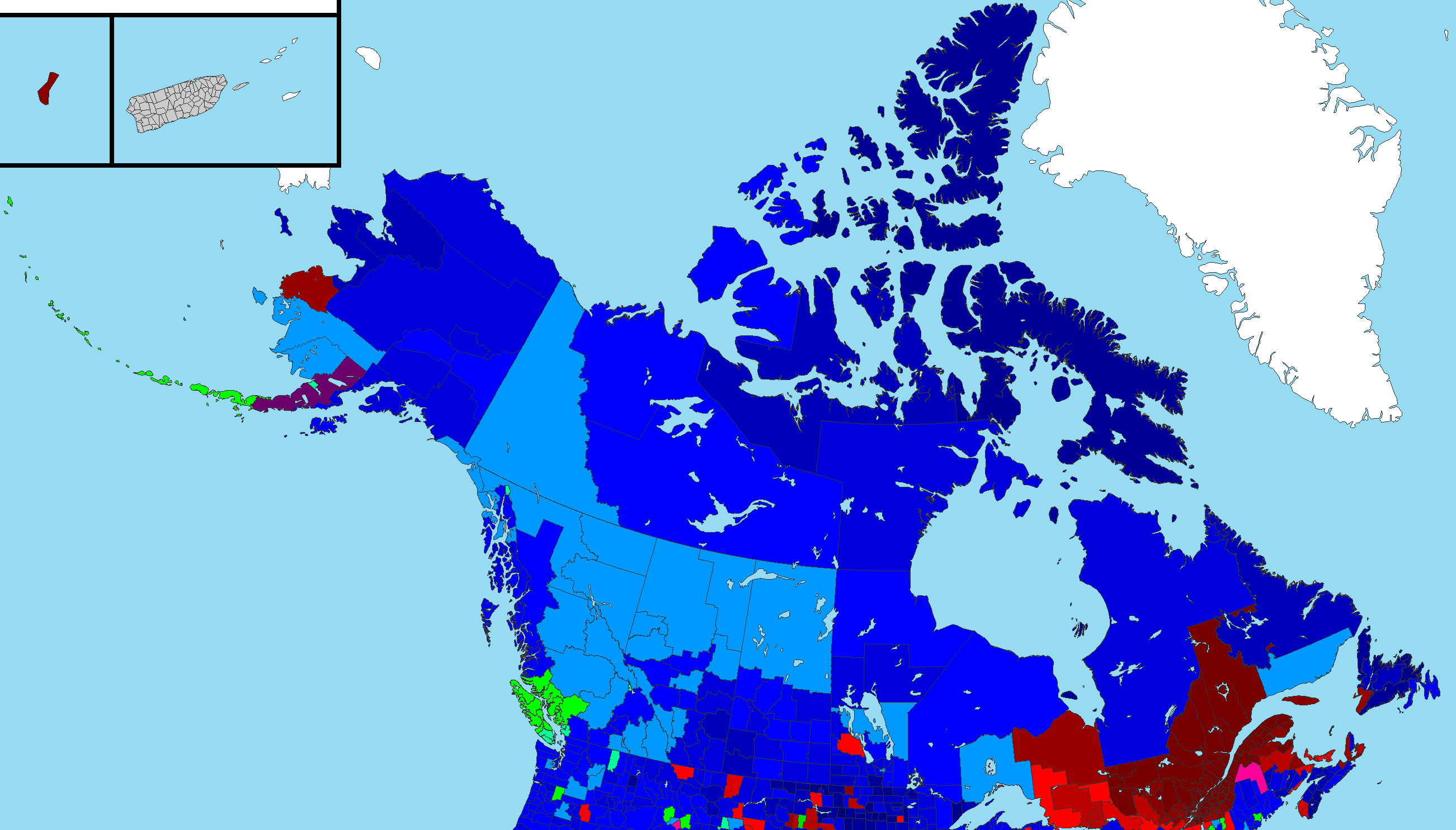 Map of largest religions in Canada.